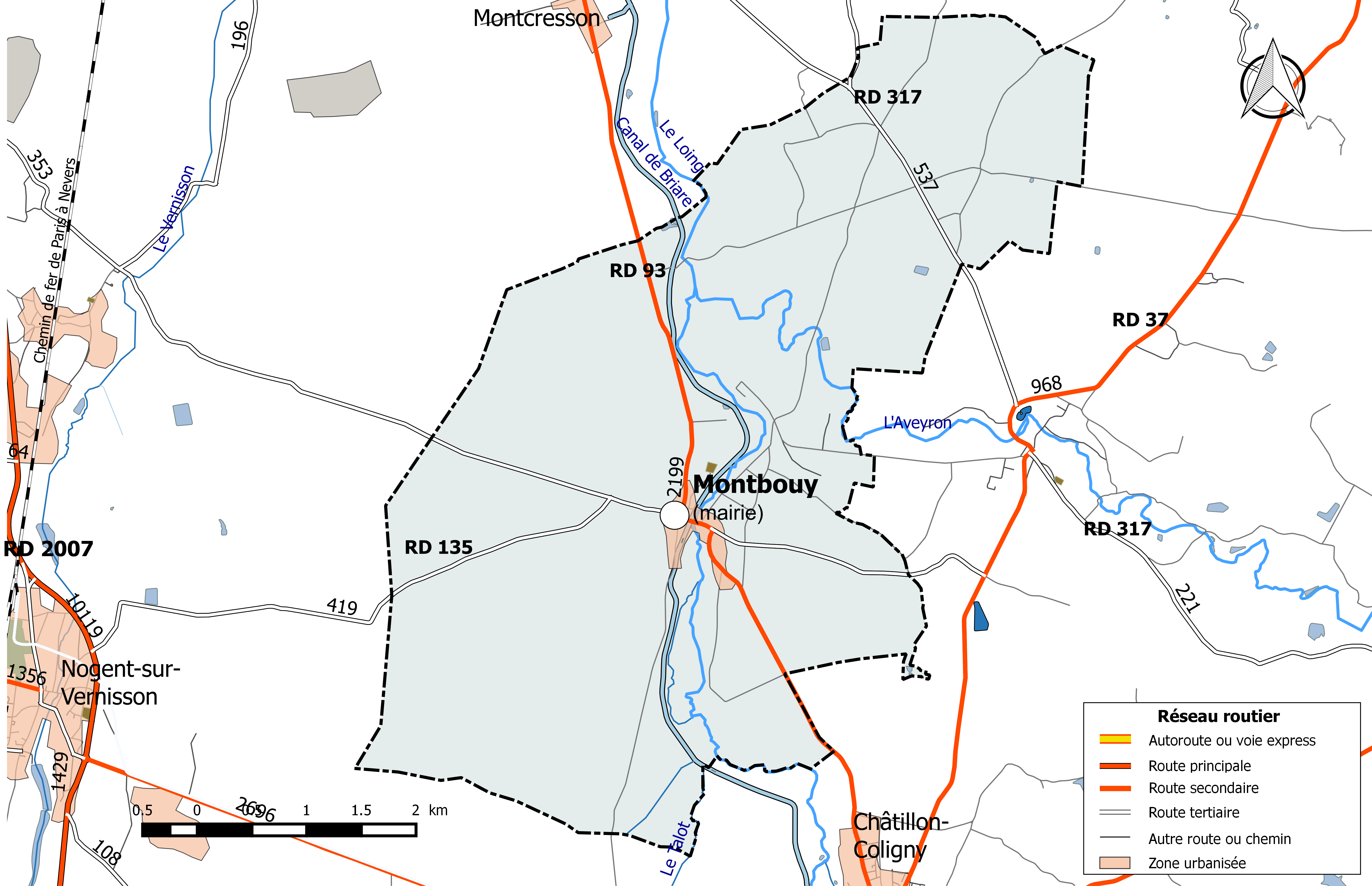 Carte du réseau routier de la commune de Montbouy.